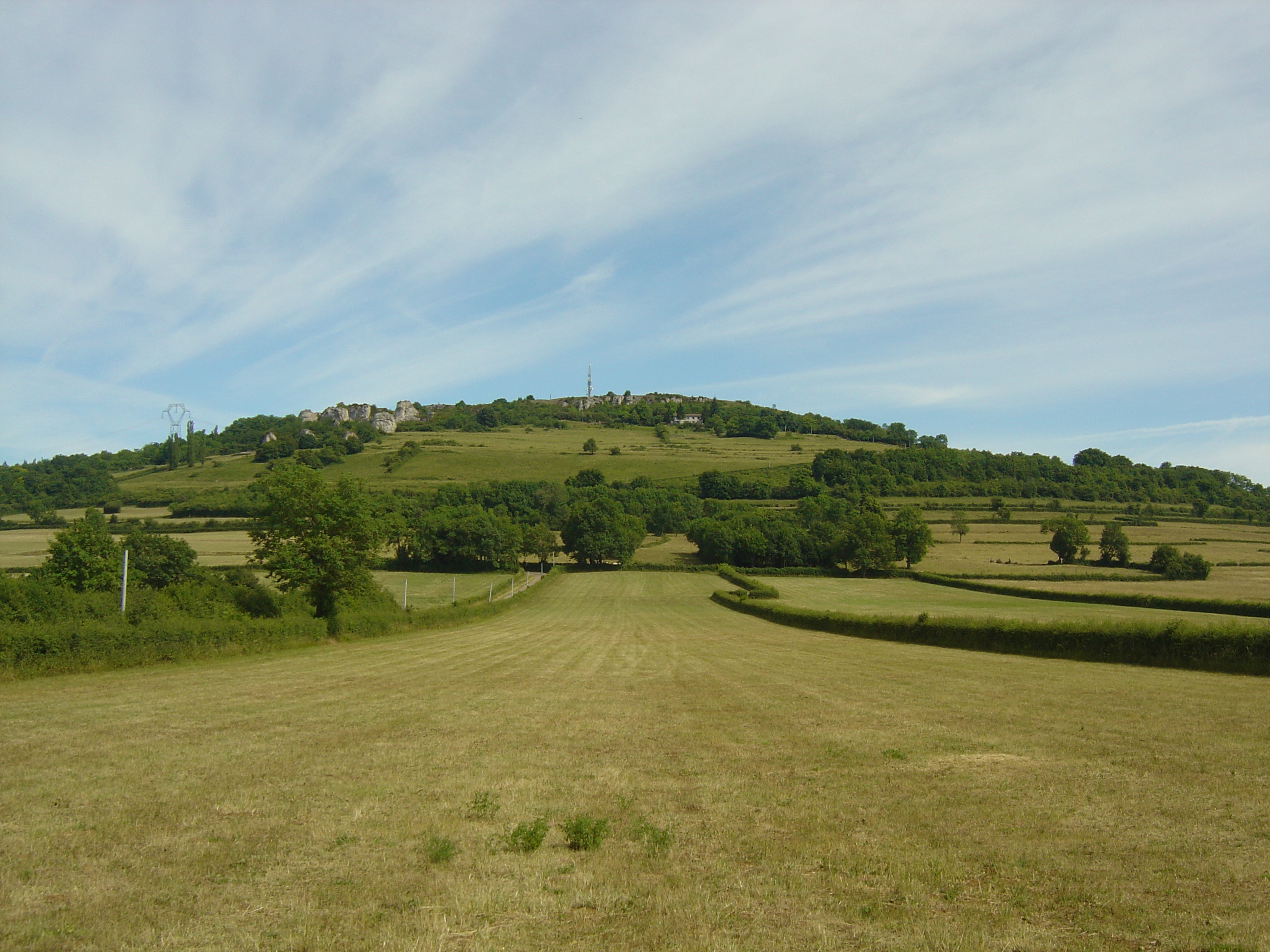 Le Mont de Rome Château (545m) vu depuis Saint-Sernin-du-Plain Bourgogne, Saône-et-Loire